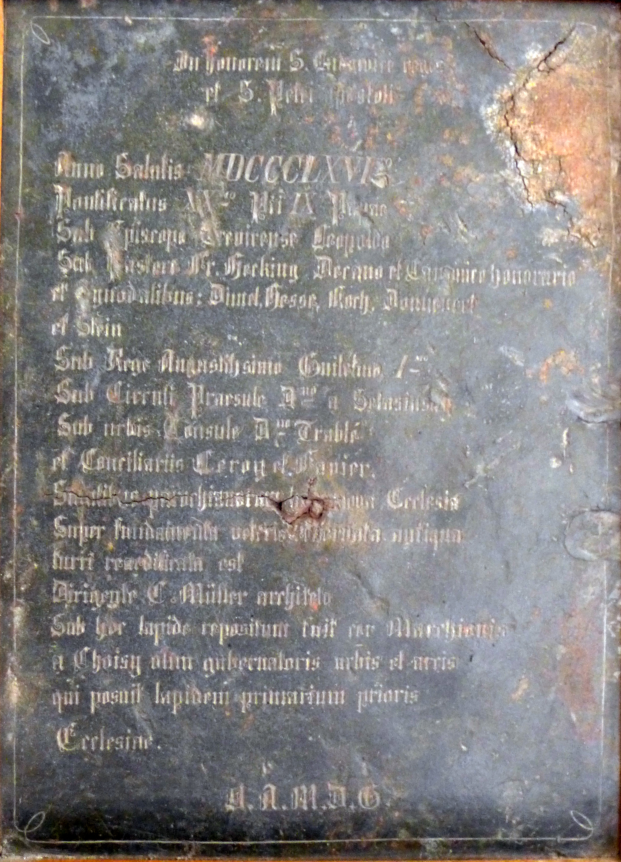 St. Ludwig (Saarlouis), Bleitafel über der Herzkapsel von Thomas de Choisy aus der neogotischen Kirche, wiedergefunden 1965 beim Abriss des Kirchenschiffes, Dt. Übertragung der lateinischen Inschrift: "Zu Ehren des heiligen Königs Ludwig und des heiligen Apostels Petrus. Im Jahre des Heiles 1866, im zwanzigsten Jahr des Pontifikates des Papstes Pius IX., unter dem Bischof von Trier Leopold, unter dem Pfarrer Hecking, Dechant und Ehrendomherr, und den Kirchenvorstandsmitgliedern Dimel, Hesse, Koch, Donnevert und Stein, unter dem erhabenen König Wilhelm I., unter dem Landrat Herrn von Selasinsky, unter dem Bürgermeister Trablé und dem Beigeordneten Leroy und Favier ist diese neue Kirche zum Heile der Pfarrangehörigen auf den Fundamenten der alten Kirche unter Beibehaltung des früheren Turmes wiedererrichtet worden. Die Leitung hatte der Architekt C. Müller. Unter diesem Stein ruht das Herz des Grafen Choisy, einst Stadt- und Festungskommandant, der damals den Grundstein der ersten Kirche legte. Alles zur größeren Ehre Gottes. "